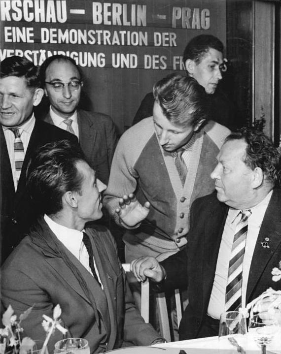 Friedensfahrt, Chemnitz, Fahrerehrung Zentralbild 12.5.1961 XIV. Internationale Friedensfahrt Warschau -Berlin Prag 1961. Mit einem dreifachen Hoch wurden am 12.5.1961 die sowjetischen Friedensfahrer am Ruhetag in Karl-Marx-Staadt im Kulturpalast der Werktätigen empfangen. Über 1000 Karl-Marx-Städter hatten sich eingefunden, um das sowjetische Team, das einer Einladung der SDAG Wismut gefolgt war, mit geradezu überschwenglichen Jubel zu empfangen. UBz: Hannes Schober gibt dem Kapitän der sowjetischen Mannschaft, Viktor Kapitonow (links), gute Ratschläge für die Bergetappen. Rechts: der Volkskammerabgeordnete Sepp Wenig.